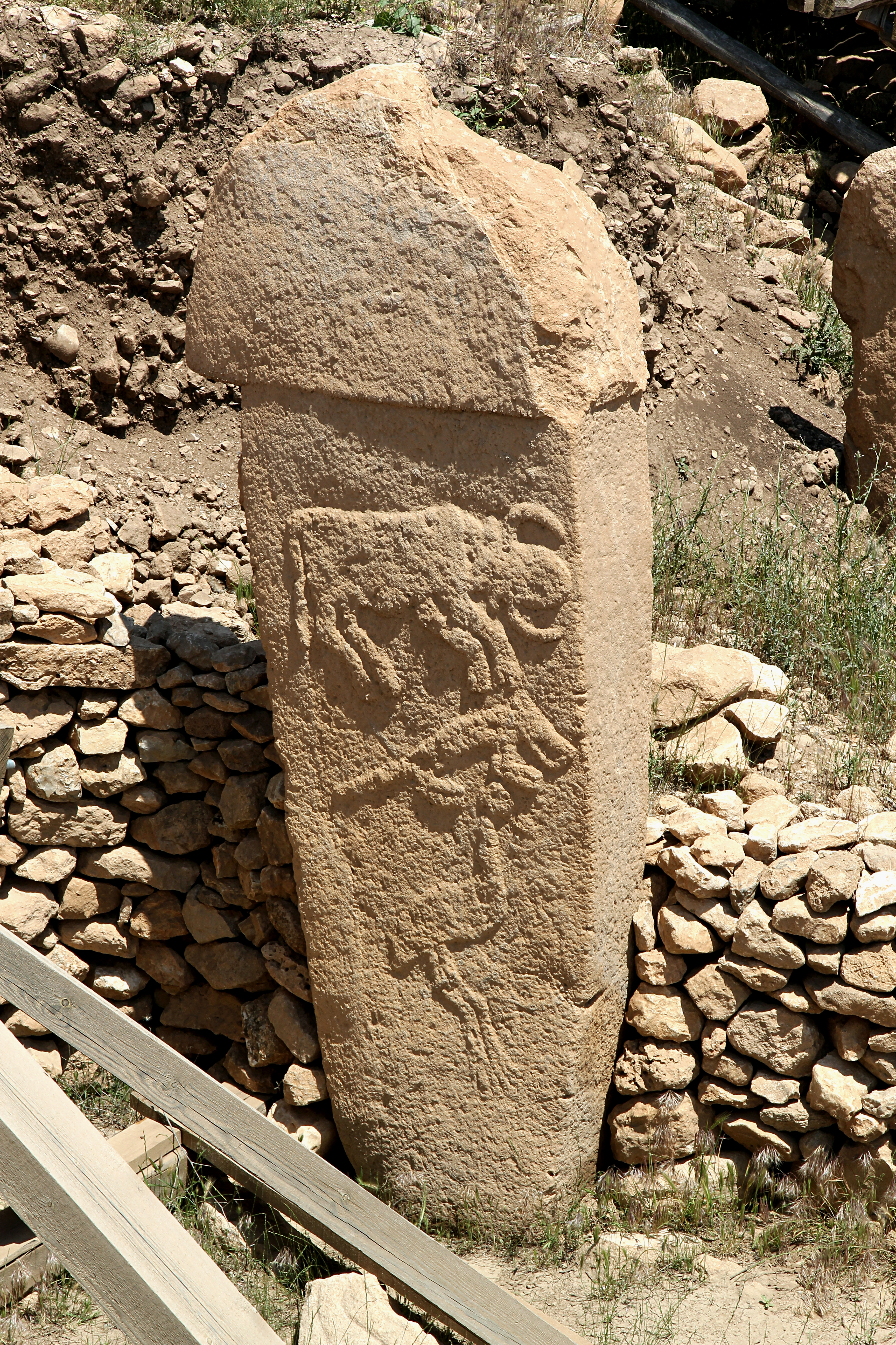 Göbekli Tepe, Siedlungshügel bei Şanlıurfa, Südosttürkei, Anlage A Pfeiler 2